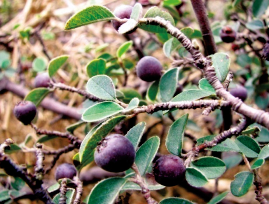 Qaya dovşanalması